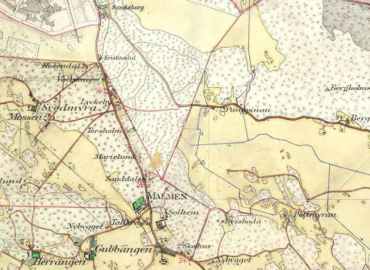 Tallkrogen, Mossen och Malmen på Häradsekonomiska kartan. Mitt i kartbilden ligger idag Skogskyrkogården.